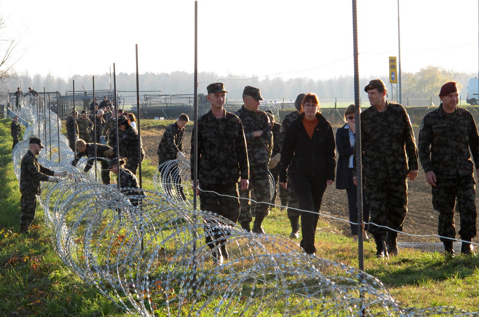 Ministrica obiskala pripadnike Slovenske vojske in URSZR, ki pomagajo v nastanitvenem centru in na meji.